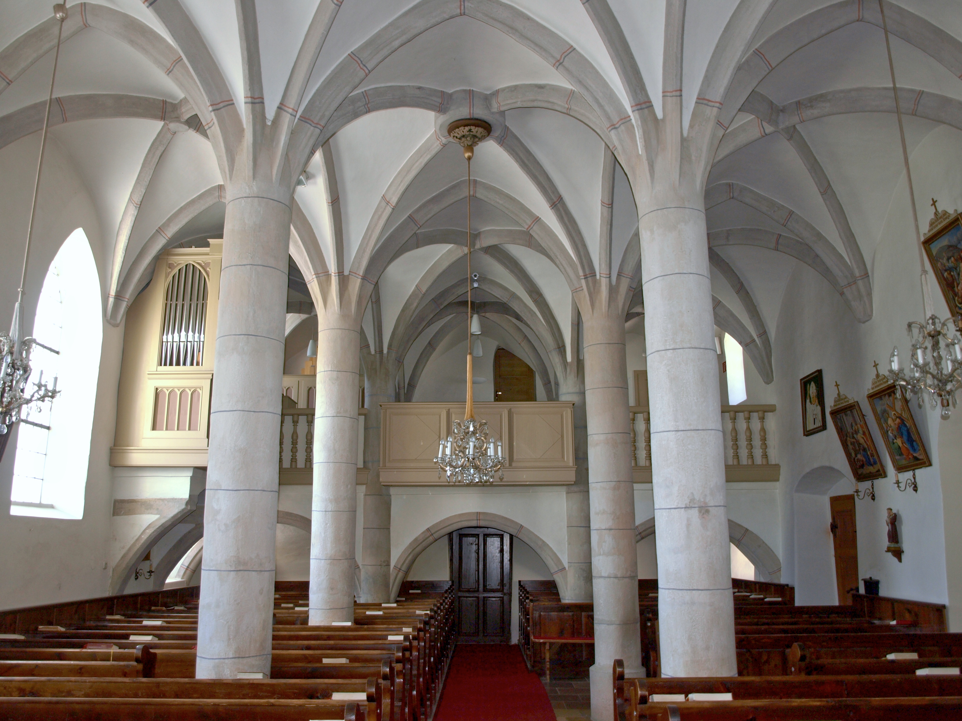 Kath. Pfarrkirche hl. Nikolaus und Friedhof